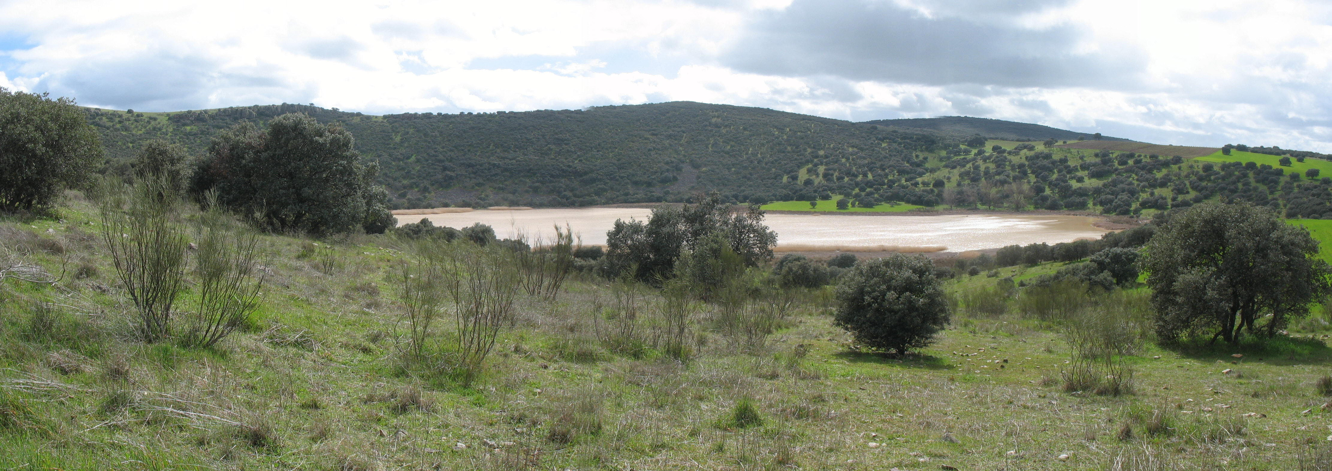 Laguna de La Posadilla (Valverde, Ciudad Real, España). Maar producido por una erupción hidromagmática en el ámbito de la región volcánica del Campo de Calatrava.